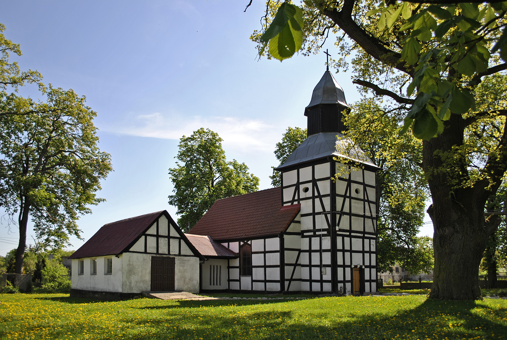 Siedlice - kościół pw. Niepokalanego Poczęcia NMP